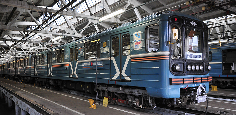 Именной электропоезд метро 81-717/714 "Народный ополченец" в здании депо